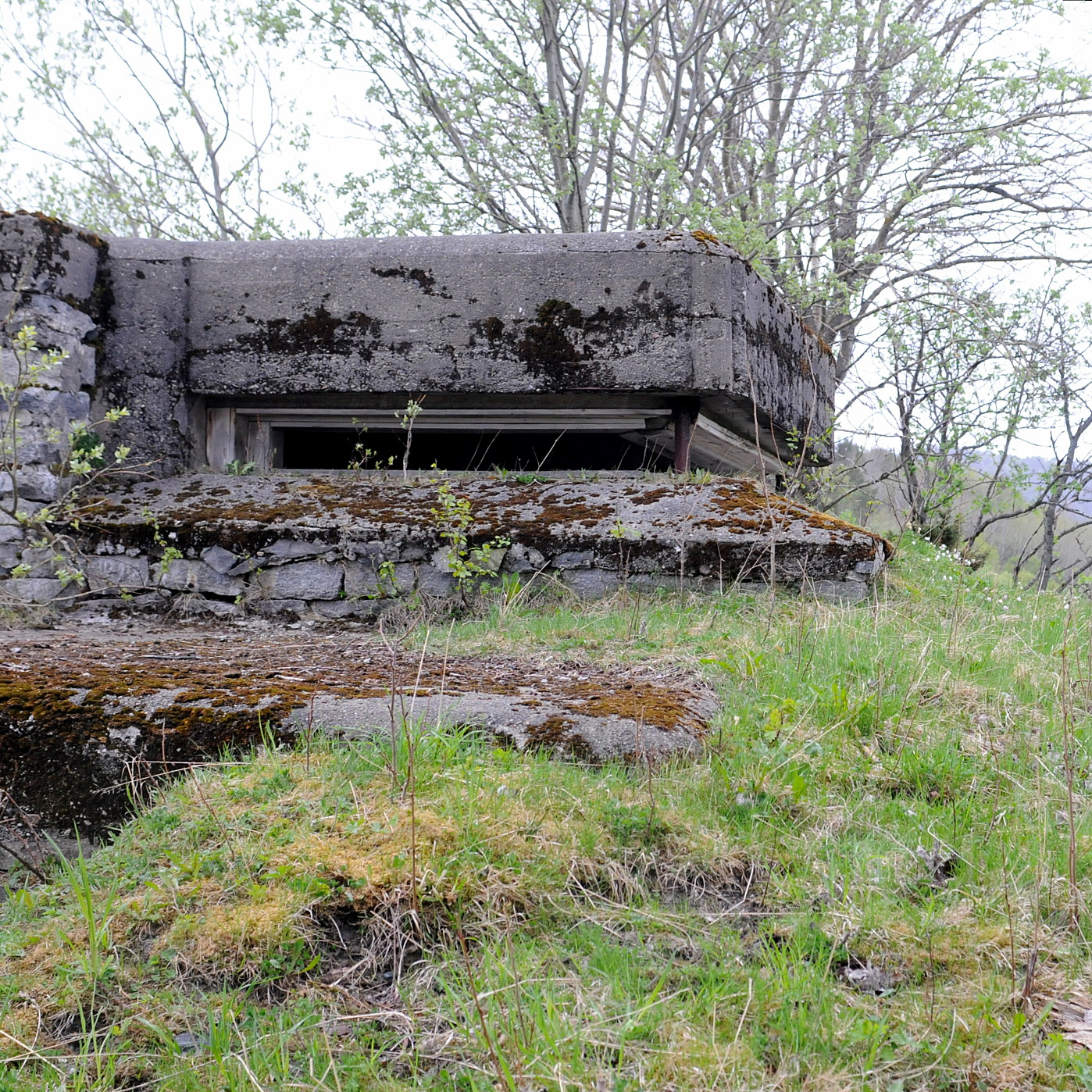 MAB 5./506 Stördal